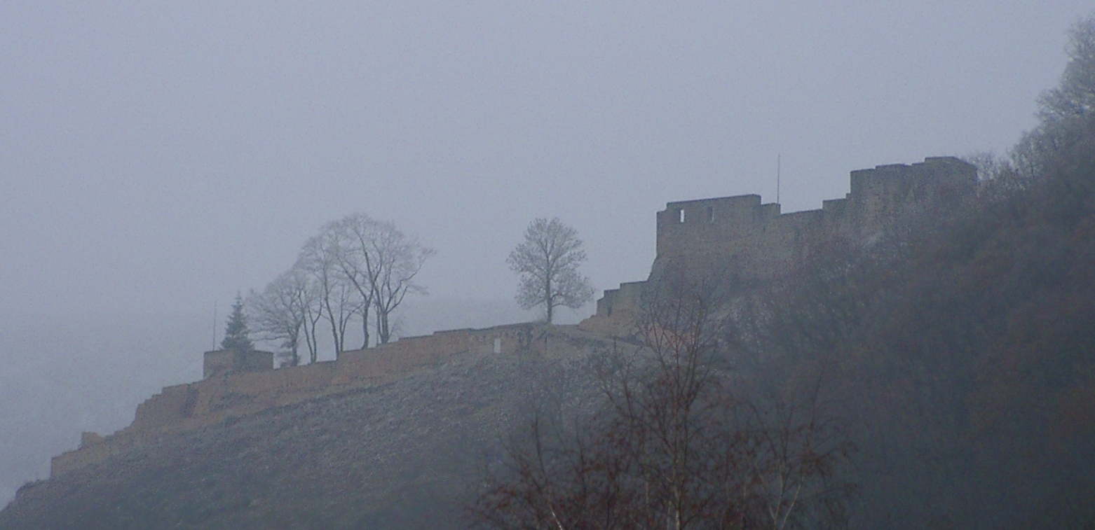 Burgruine Wolfsburg